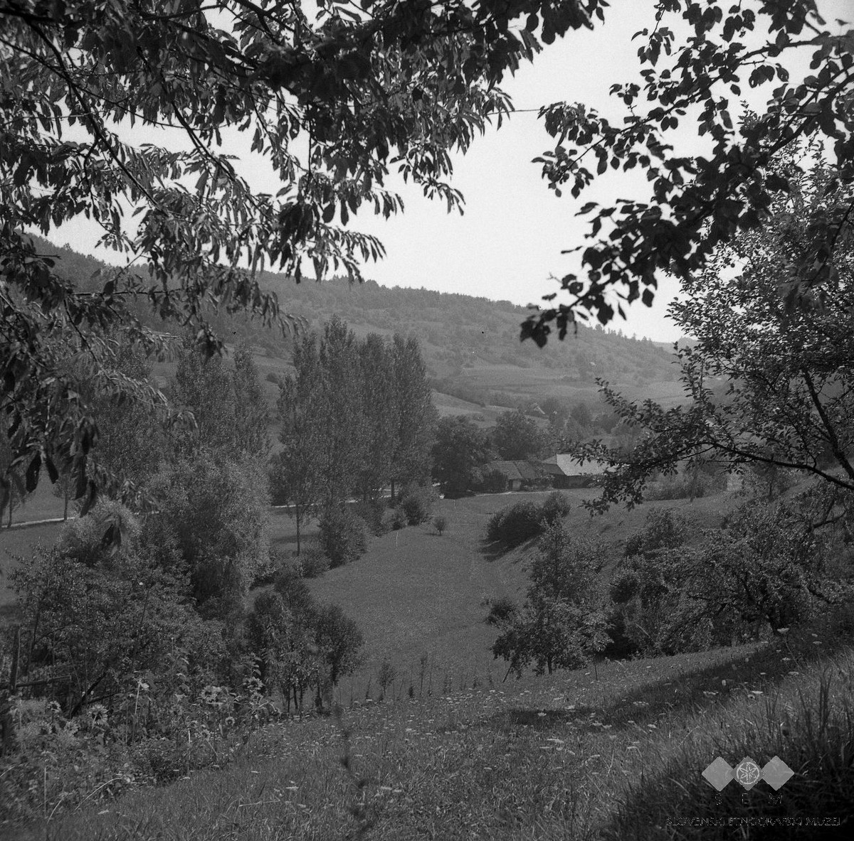 Bukovica.